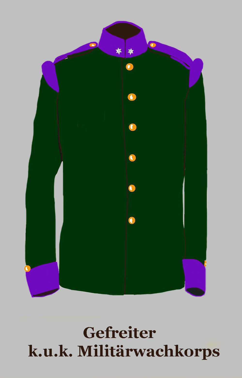 Waffenrock k.u.k. Militärwachkorps